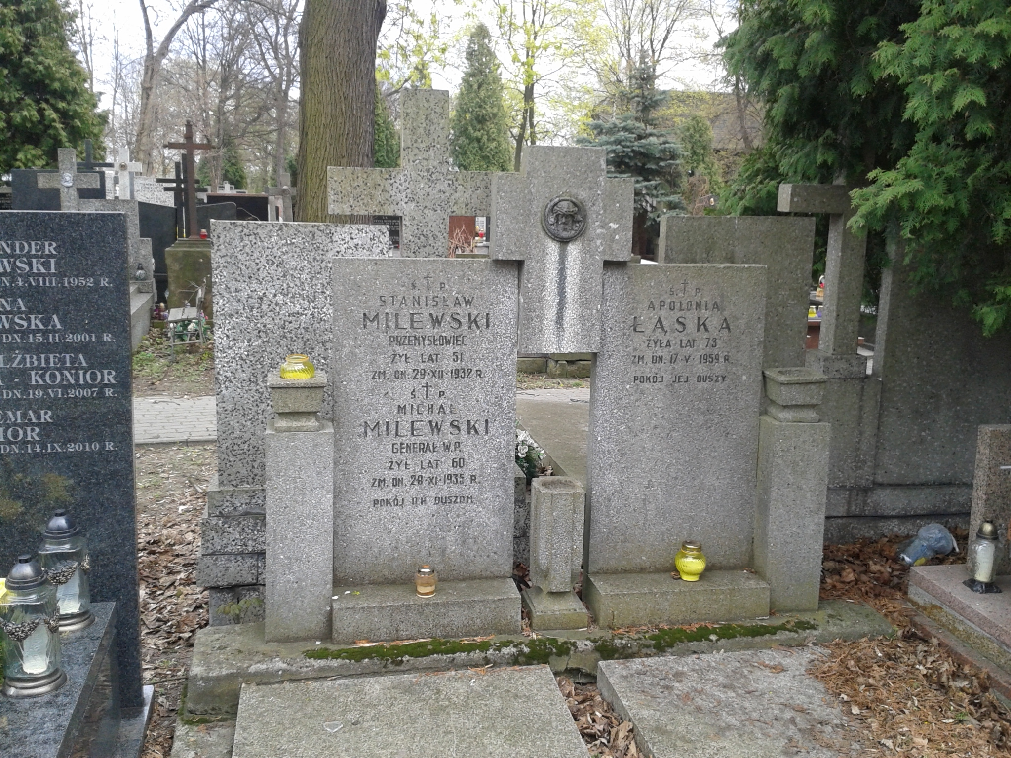 Grób rodziny Milewskich na Cmentarzu Bródnowskim w Warszawie